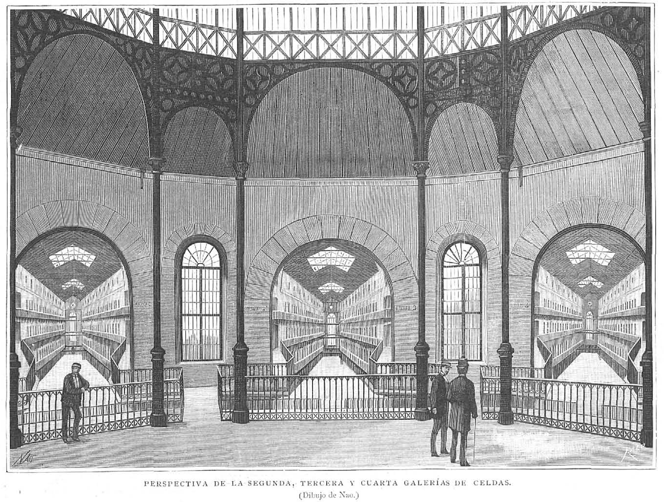 Perspectiva de la segunda, tercera y cuarta galerías de celdas, de la Cárcel Modelo de Madrid, en la revista española La Ilustración Española y Americana.